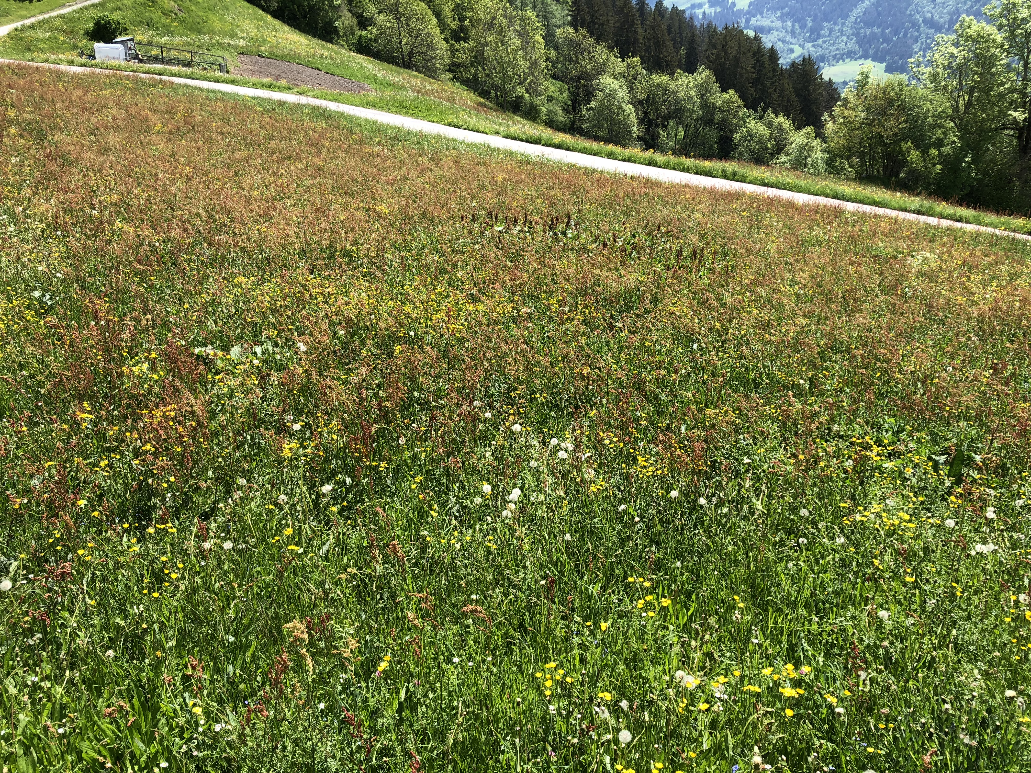 Mit Wiesen-Sauerampfe überwachsene Wiese